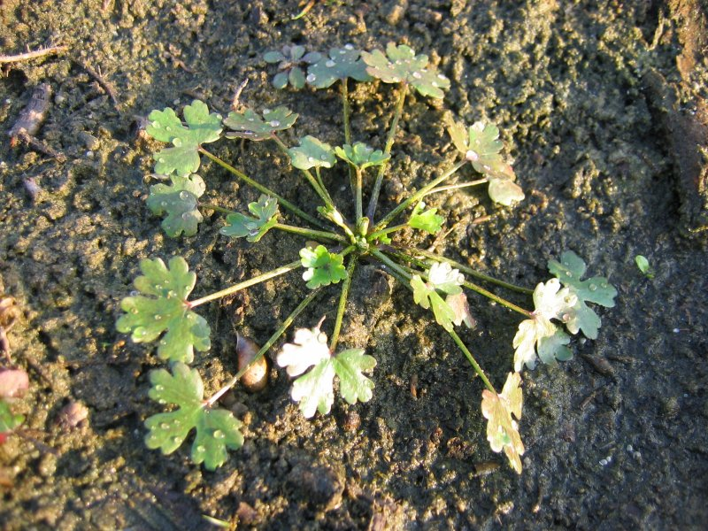 Grundblätter des Gift-Hahnenfußes Ranunculus sceleratus